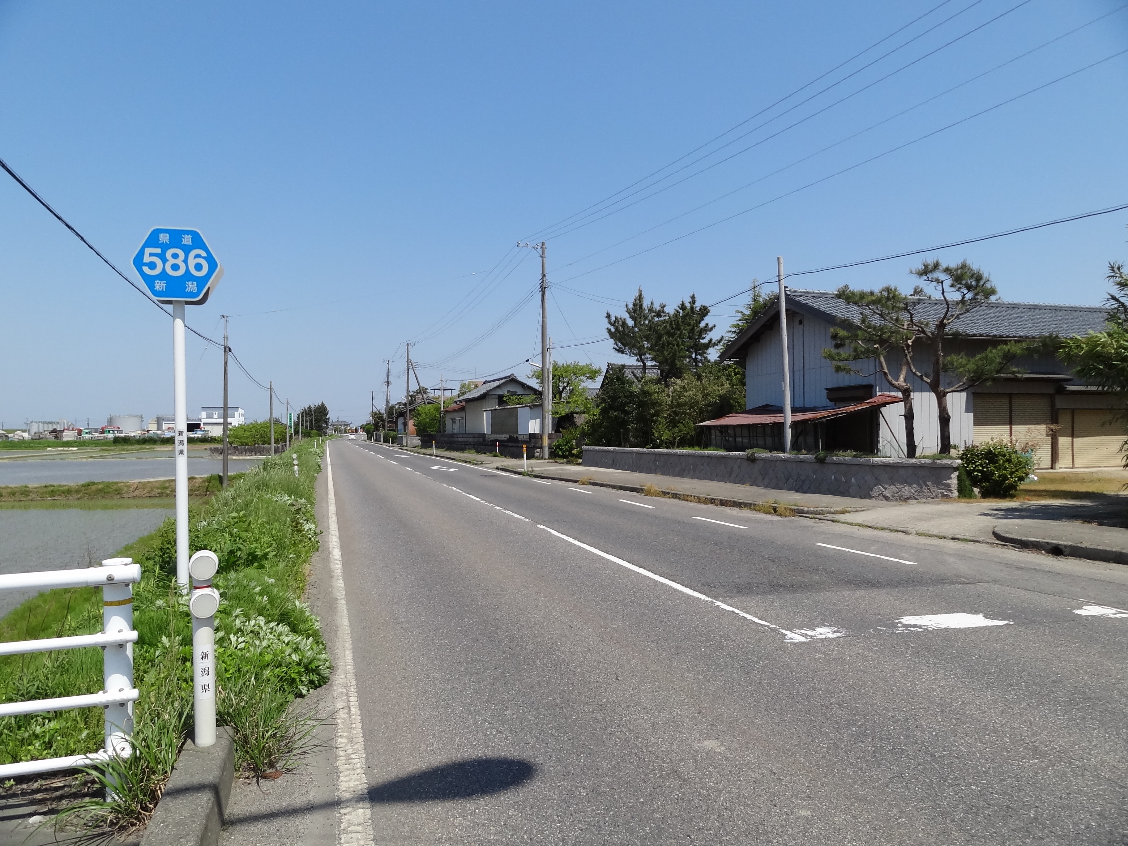 新潟県道586号水原亀田線 阿賀野市下黒瀬付近